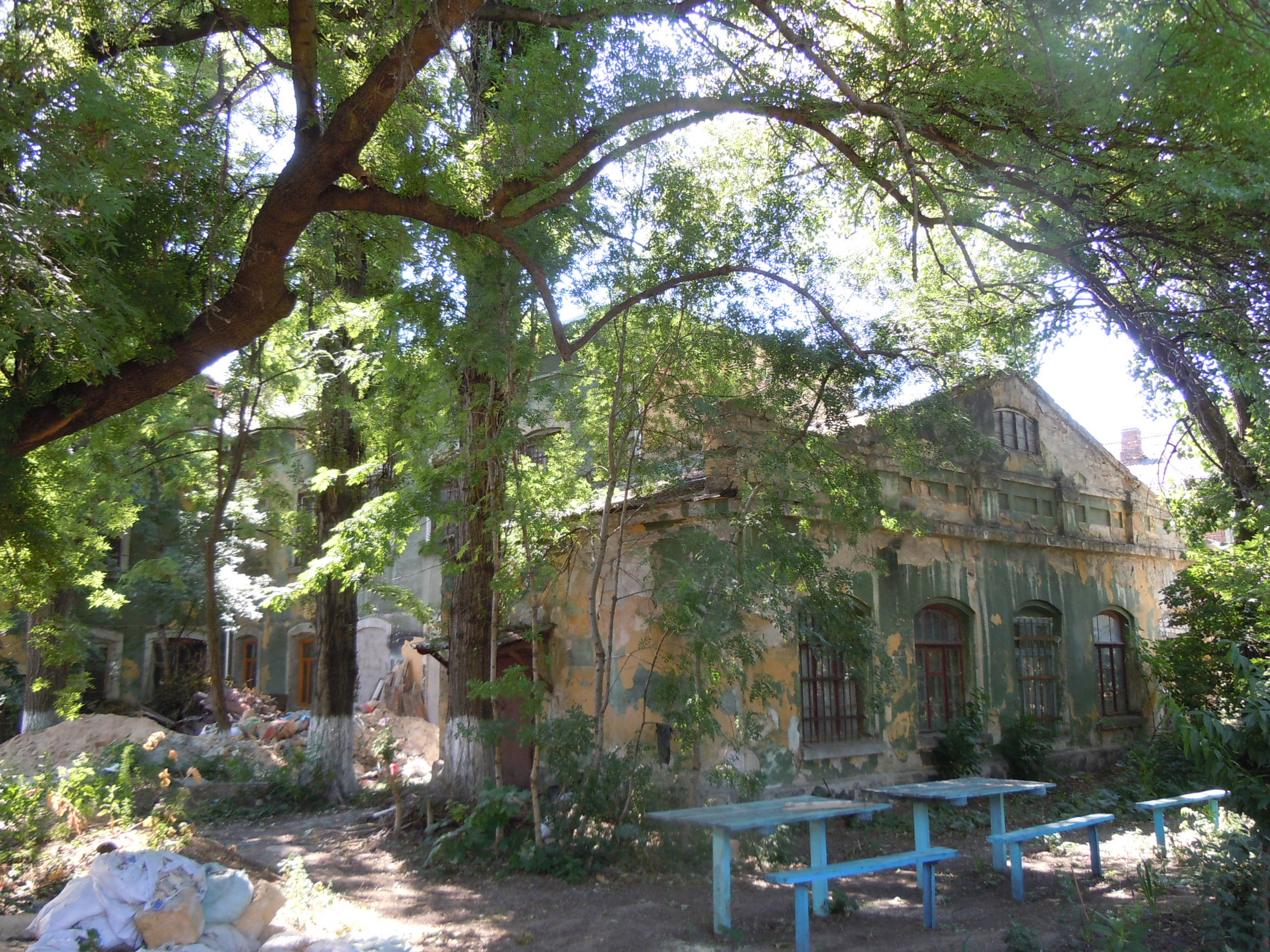 Будинки колишнього сирітського притулку, Одеса